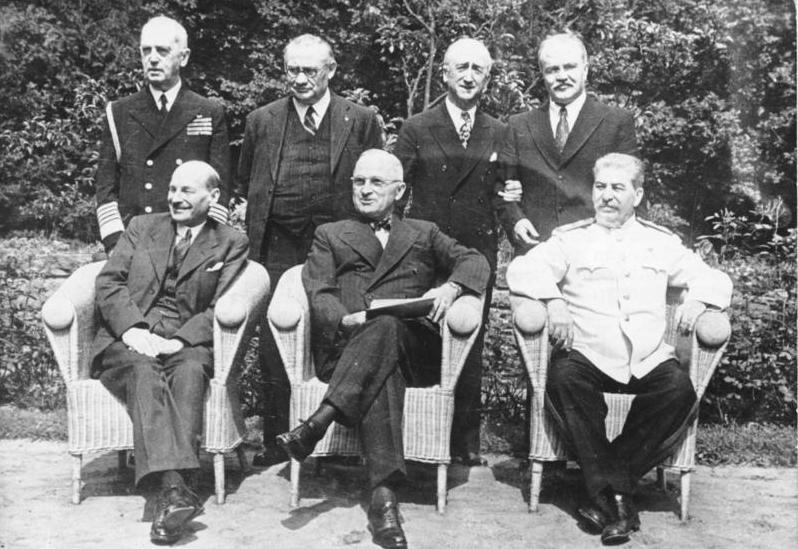 Potsdamer Konferenz, Gruppenbild Zentralbild Potsdamer (Berliner) Konferenz der führenden Staatsmänne der drei alliierten Mächte der UdSSR, Grossbritannien und der USA vom 17. Juli bis 2. August 1945 in Schloß Cecilienhof und Babelsberg. Ihr Ergebnis ist das Potsdamer Abkommen, das die völkerrechtlichen Grundfragen für den Aufbau eines friedlichen, demokratischen deutschen Staates und die Politik der Siegermächte gegenüber Deutschland festlegt. UBz: v.l.n.r.: sitzend: C.R. Attlee, H.S. Truman, Josef Stalin; stehend: Admiral J.D. Loahy, E. Bevin, J.W.Byrnes, und W.M. Molotow. [Potsdam.- Clement Attlee, Harry S. Truman, Josef Stalin in Korbsesseln sitzend; stehend dahinter: William D. Leahy, Ernest Bevin, James F. Byrnes, Wjatscheslaw Michailowitsch Molotow] Abgebildete Personen: Attlee, Clement R.: Premierminister, Vorsitzender der Labour Partei, Großbritannien (PND 118650882) Molotow, Wjatscheslaw Michailowitsch: Außenminister, Sowjetunion (PND 11873461X) Truman, Harry S.: Präsident, Demokratische Partei, USA (PND 118624210} Byrnes, James F.: Außenminister, USA Bevin, Ernest: Außenminister, Gewerkschafter, Großbritannien Leahy, William D.: Admiral, Botschafter in Frankreich, USA Stalin, Josef W.: 1878-1953; Marschall, Vorsitzender des Ministerrates, Generalsekretär der KP, Sowjetunion (PND 118642499)